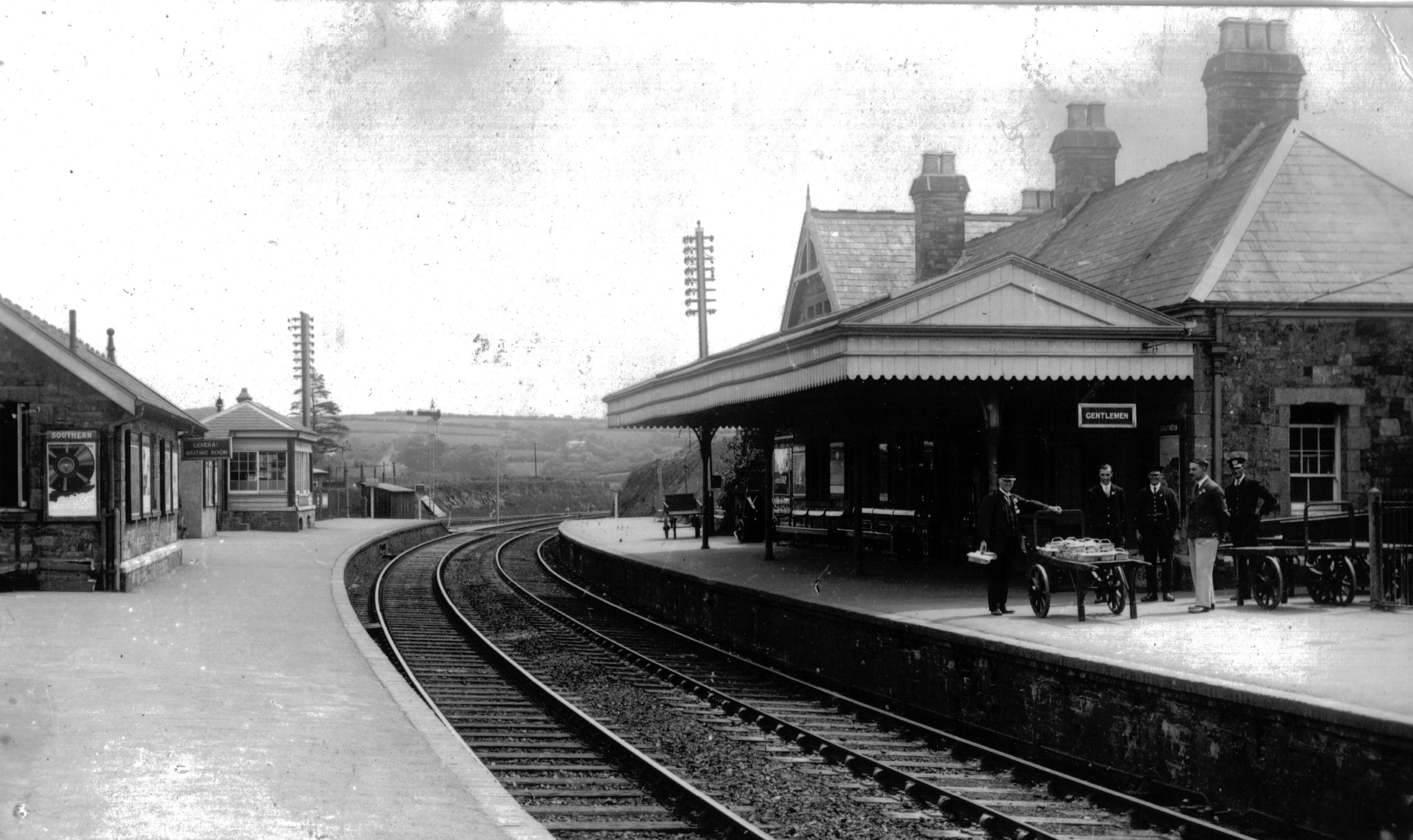 Bere Alston sttaion, Devon, 1930